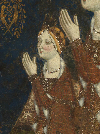 La obra muestra a la Virgen María llevando en sus brazos al Niño Jesús, y a sus pies aparecen el rey Enrique II de Castilla y el infante Juan, que llegaría a reinar como Juan I de Castilla, y también la reina Juana Manuel de Villena junto a una de sus hijas, que tal vez sea Leonor o Juana.